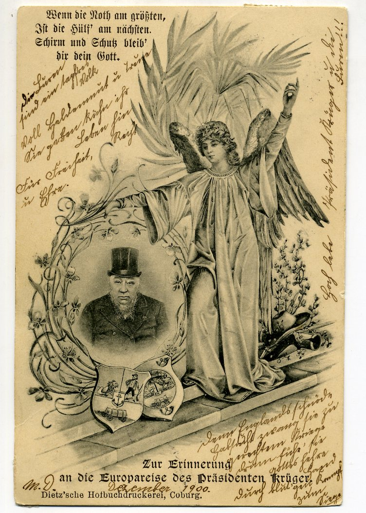 Erinnerüng an die Europareise des Präsidenten Krüger